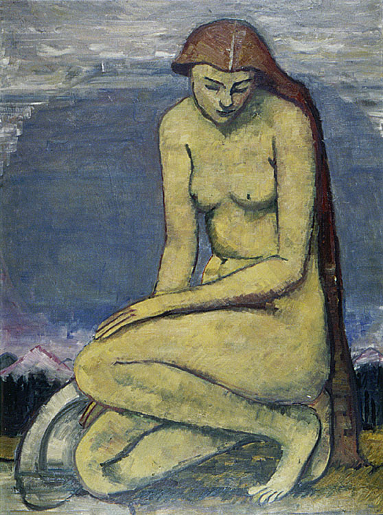 Description